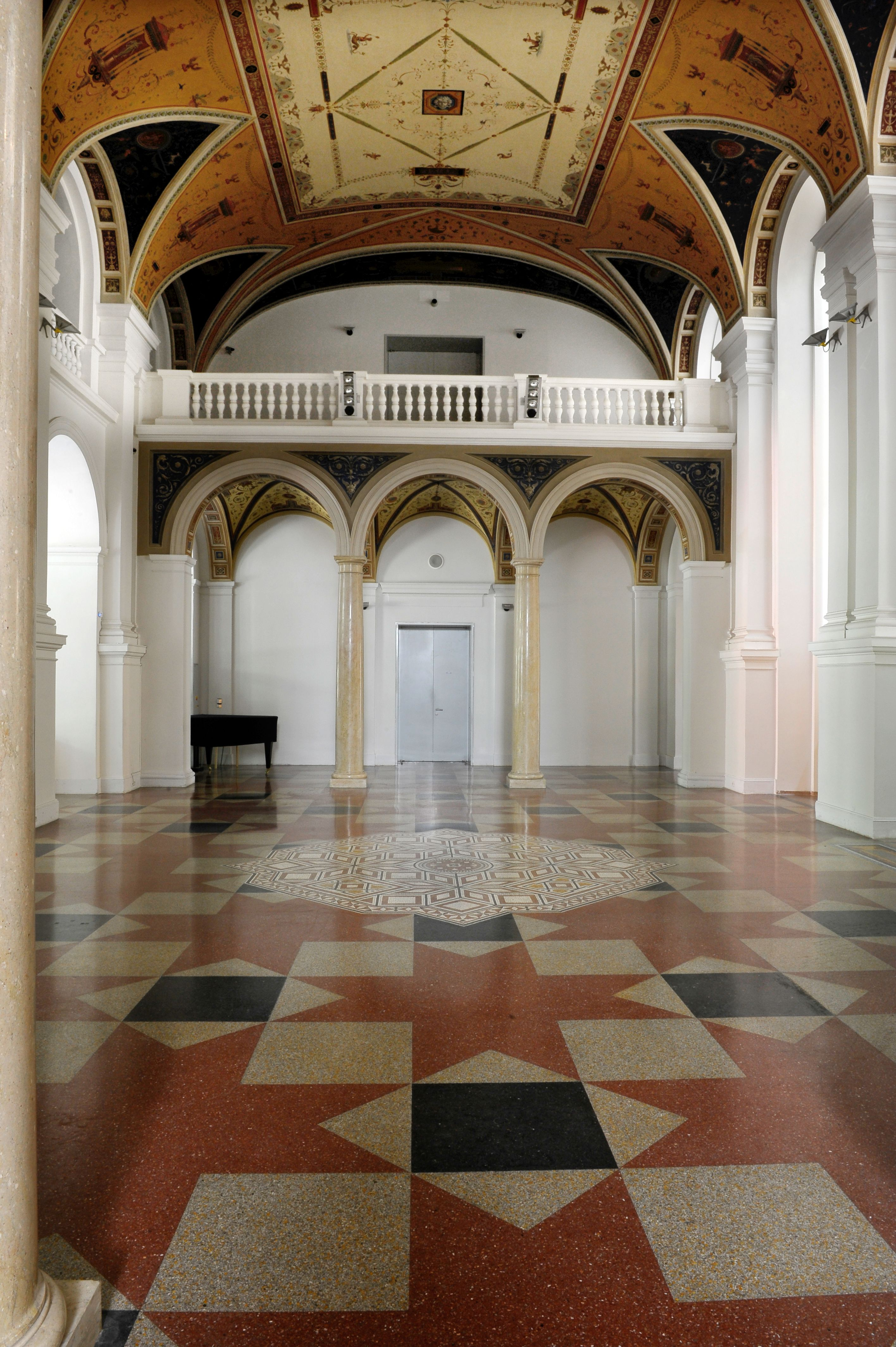 Uměleckoprůmyslové muzeum interiér